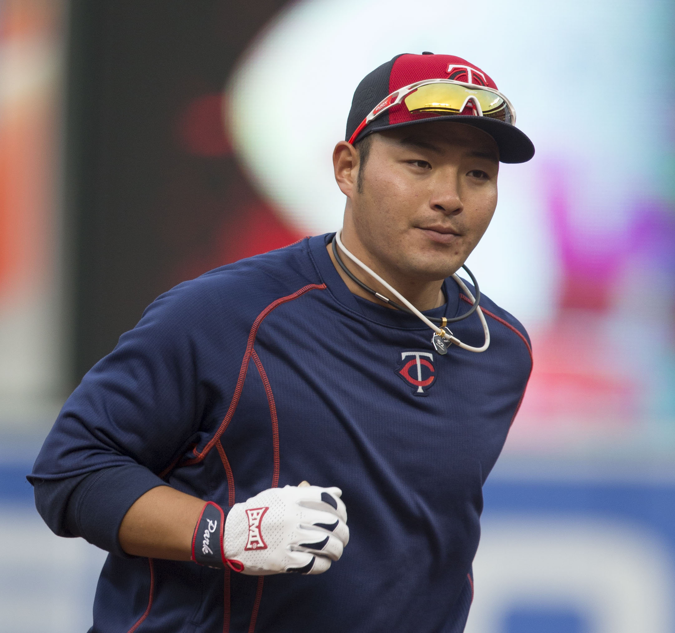 Byung-ho Park